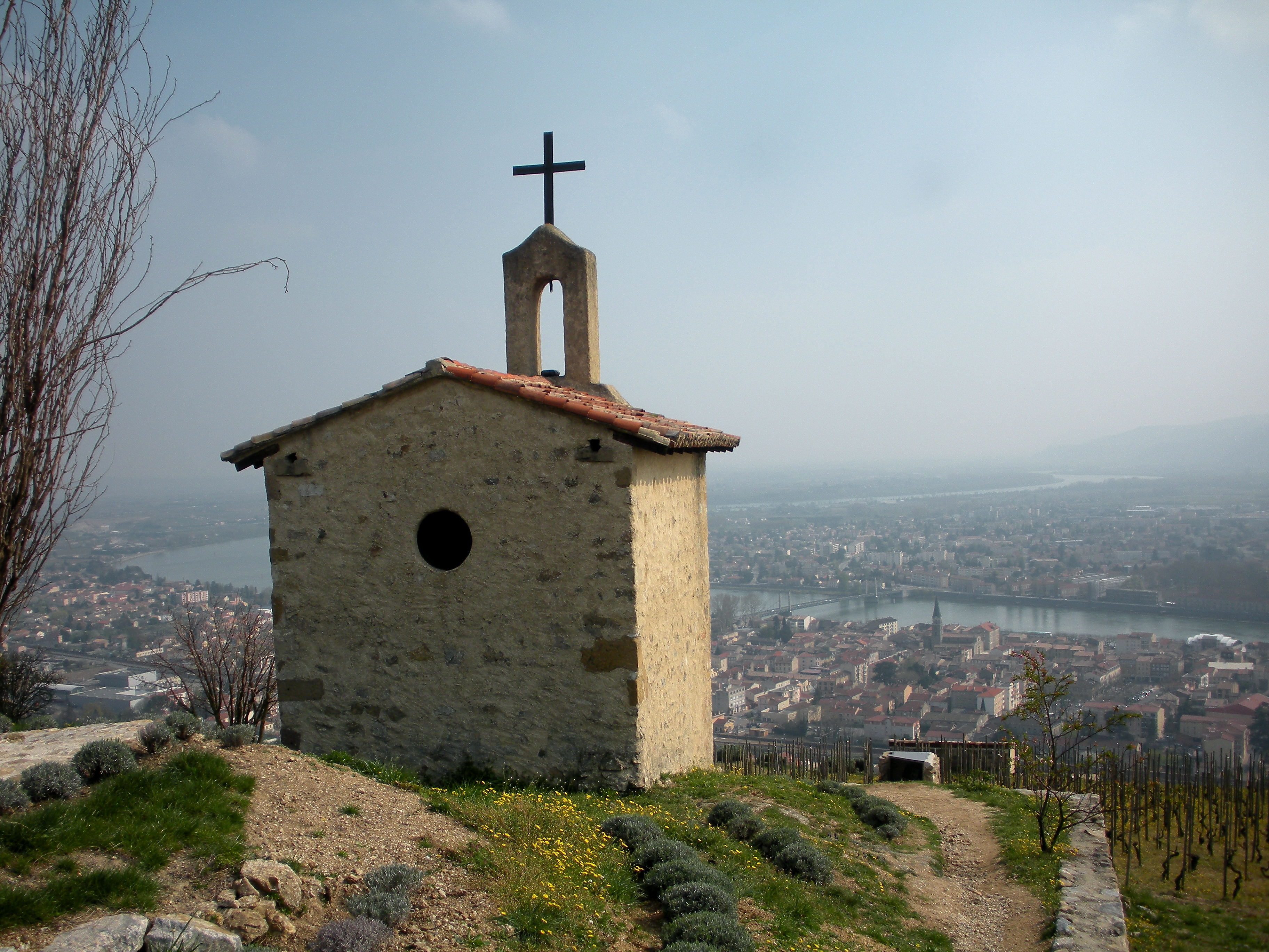 la chapelle St Christophe à Tain-l'Hermitage (Drôme, France).